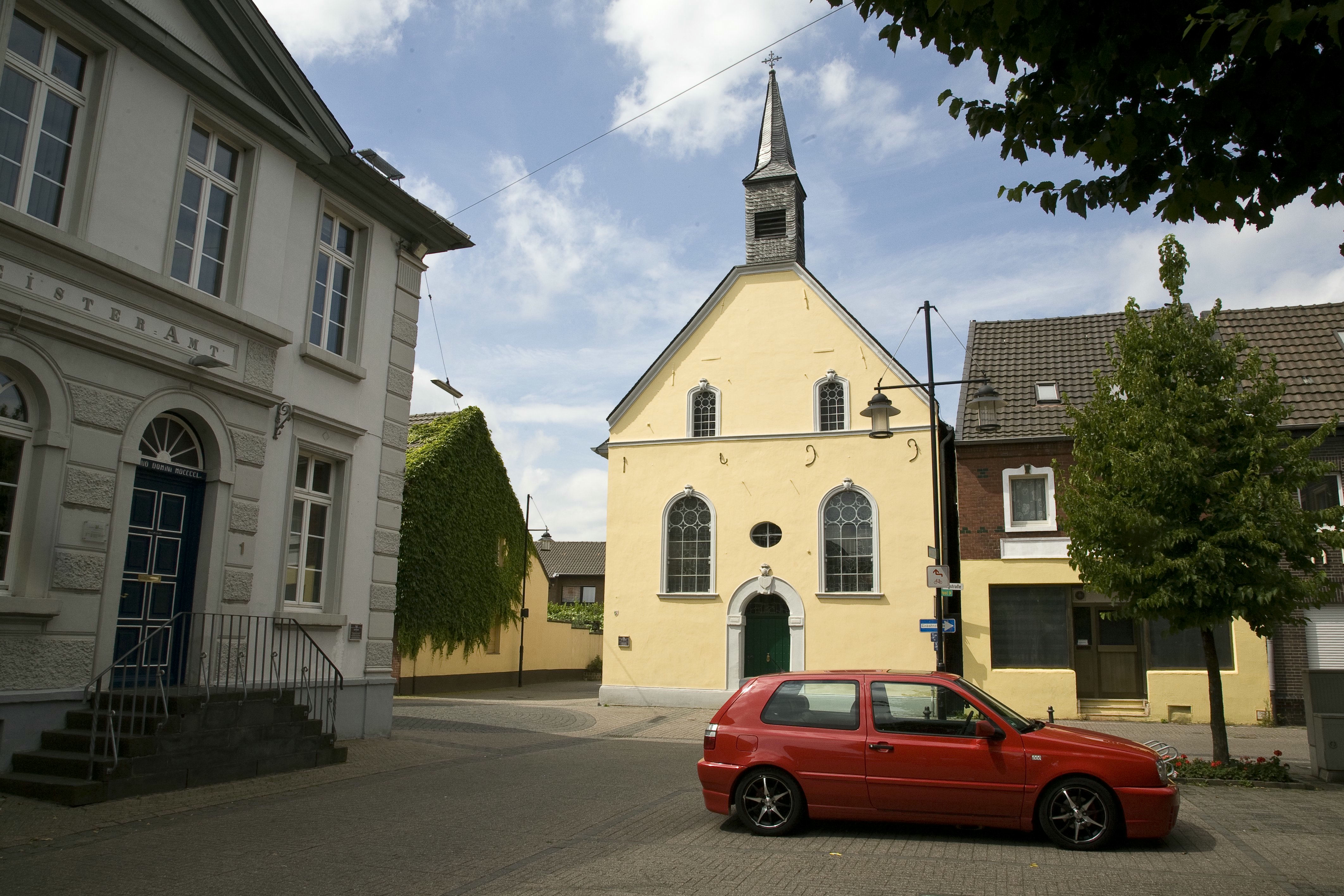 Evangelische Pfarrkirche: Zicht op voorzijde kerk (opmerking: Publicatie: TRAP Brüggen, een cultuurhistorische fietstocht)